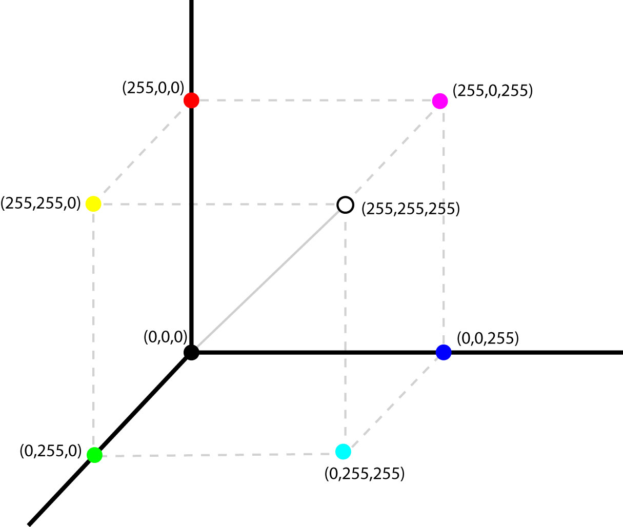 Γραφική απεικόνιση του 8bit χρωματικού μοντέλου RGB Άδεια χρήσης Το παραπάνω αρχείο διανέμεται υπό τις δύο παρακάτω άδειες χρήσης. Μπορείτε να επιλέξετε την άδεια της προτίμησής σας.